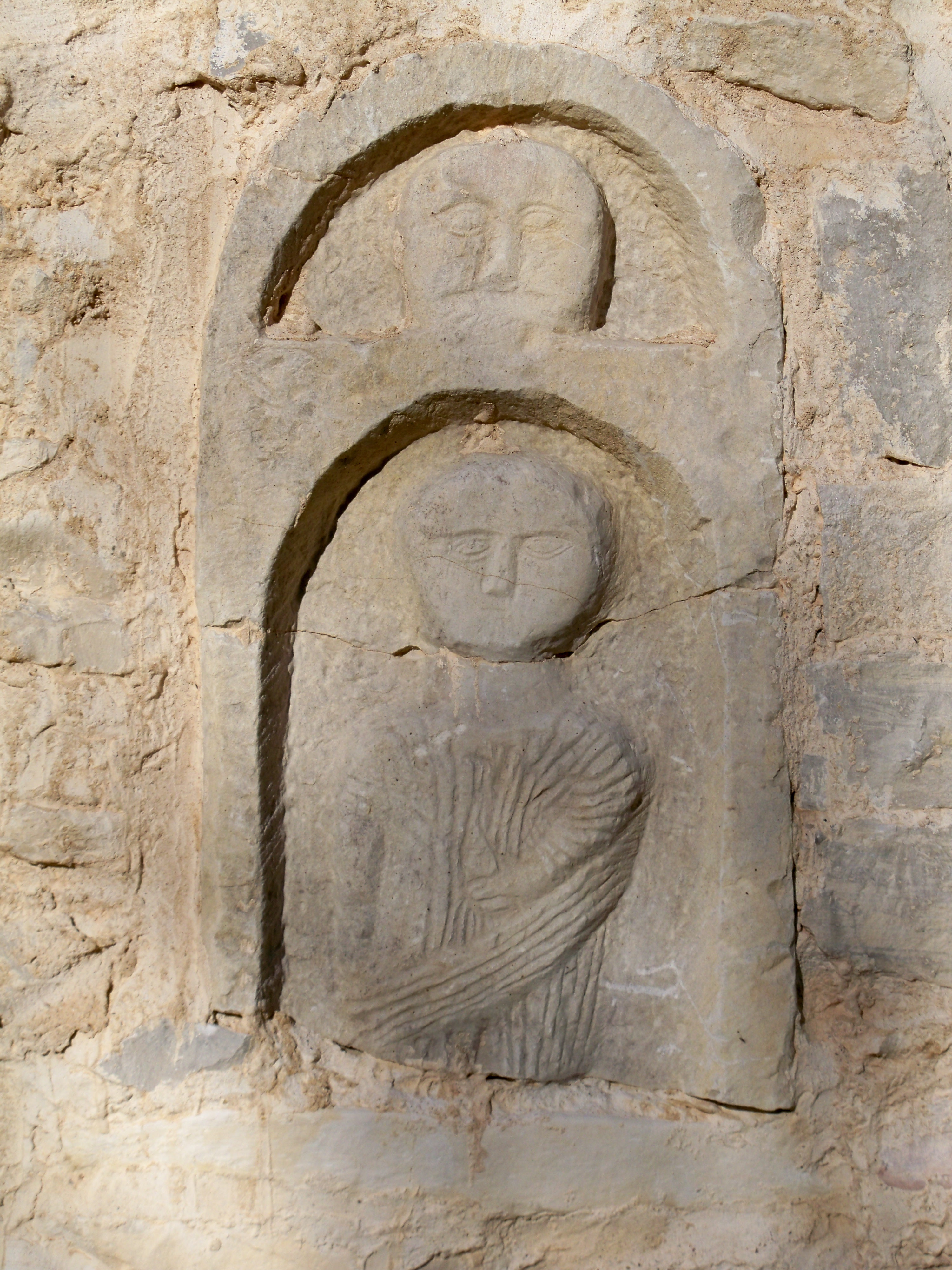 Pierre en réemploi, en facade d'une maison près du pont